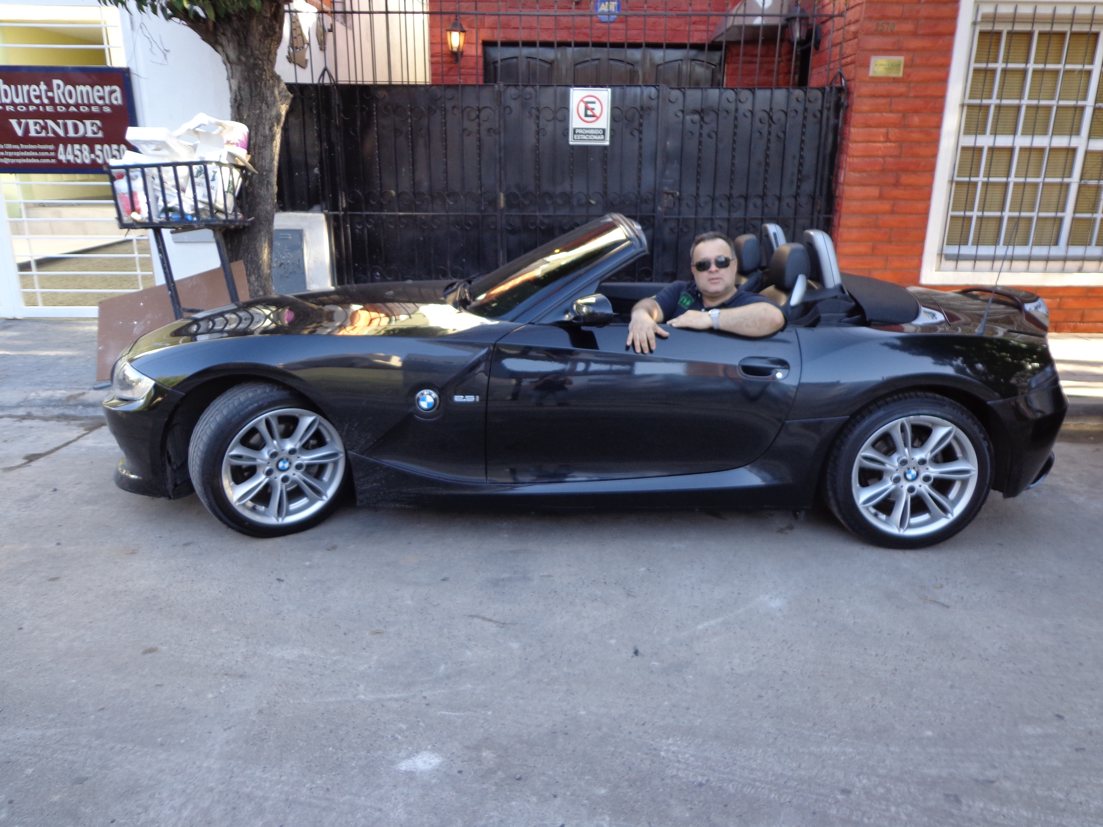 Carlos A Telleldin año 2012